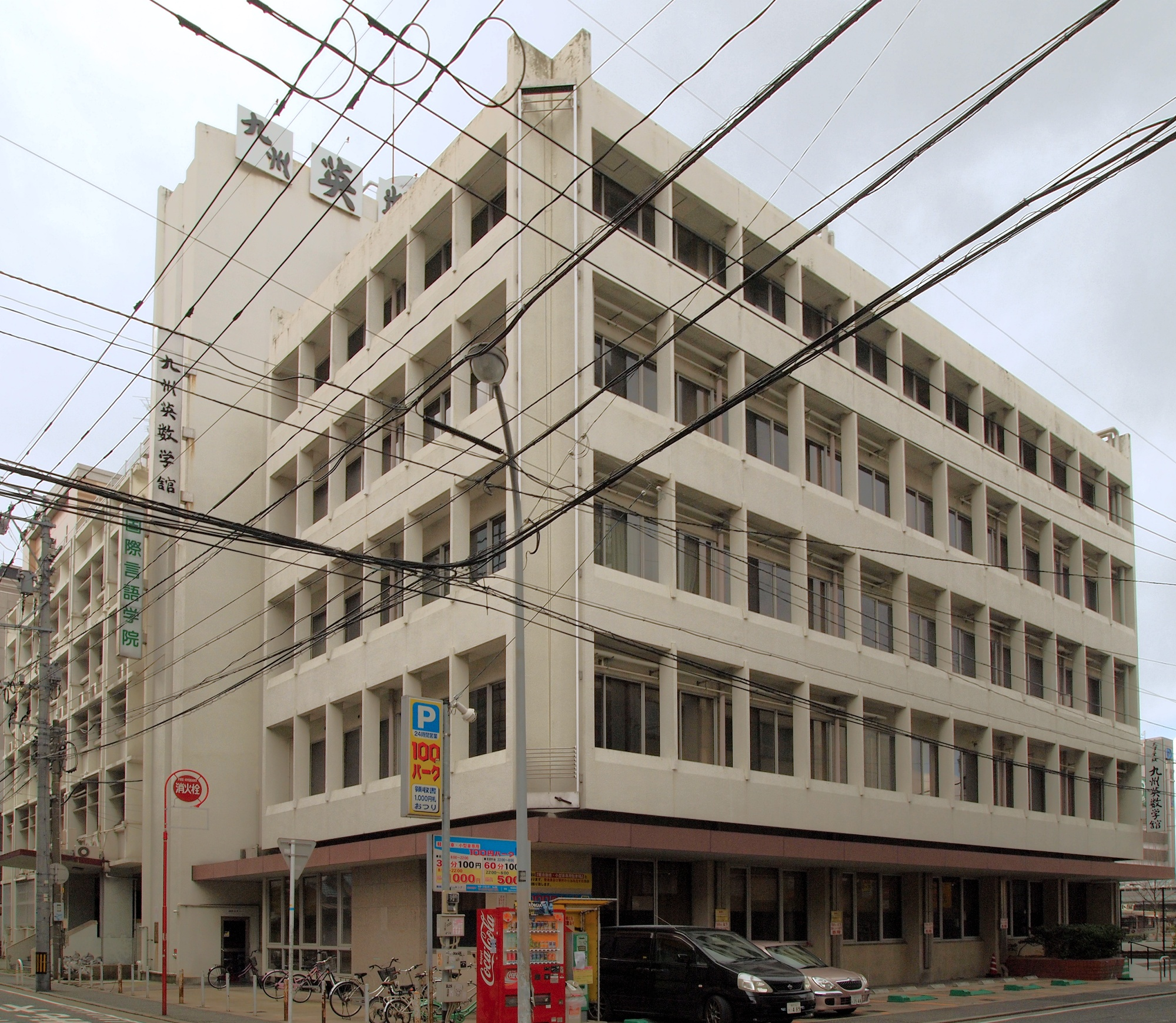 福岡県福岡市中央区 私立専修学校「九州英数学舘」 Zoner Photo Studio11 にて各種補正